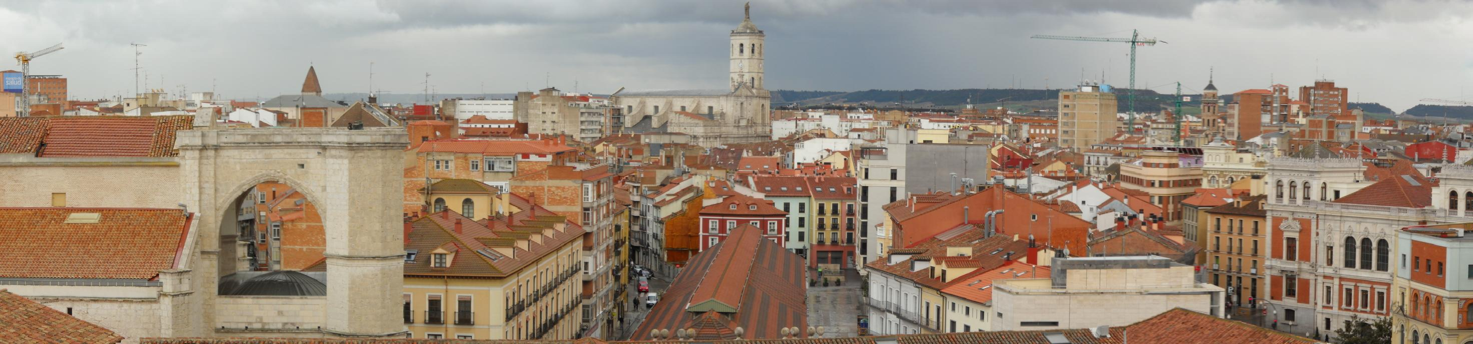 Vista panorámica del casco viejo de Valladolid. A la izquierda, la Iglesia de San Benito; en el centro, el mercado del Val con la Catedral al fondo; a la derecha, la fachada trasera del Ayuntamiento.